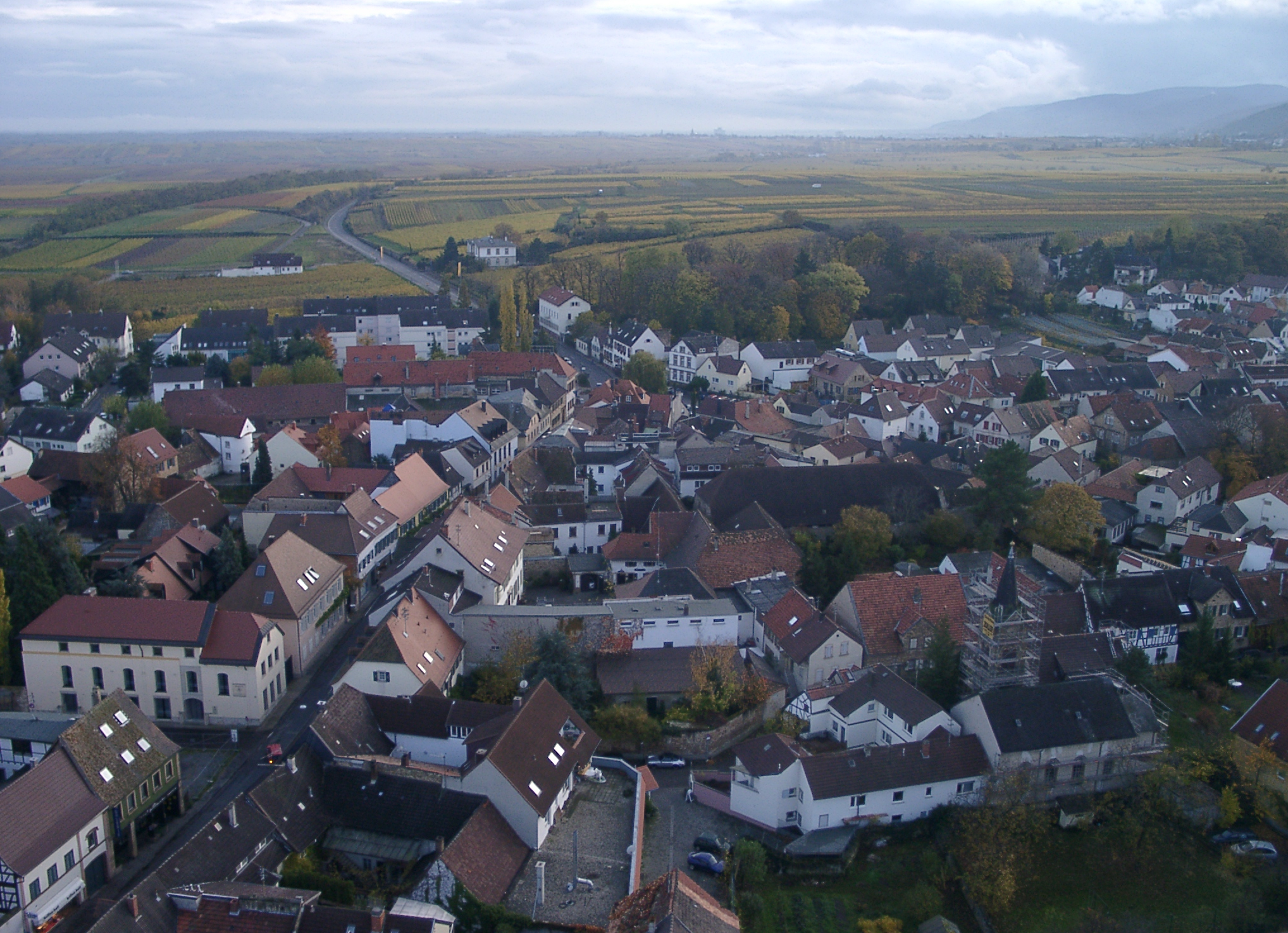 Südlicher Teil Deidesheims, Deutsche Weinstraße